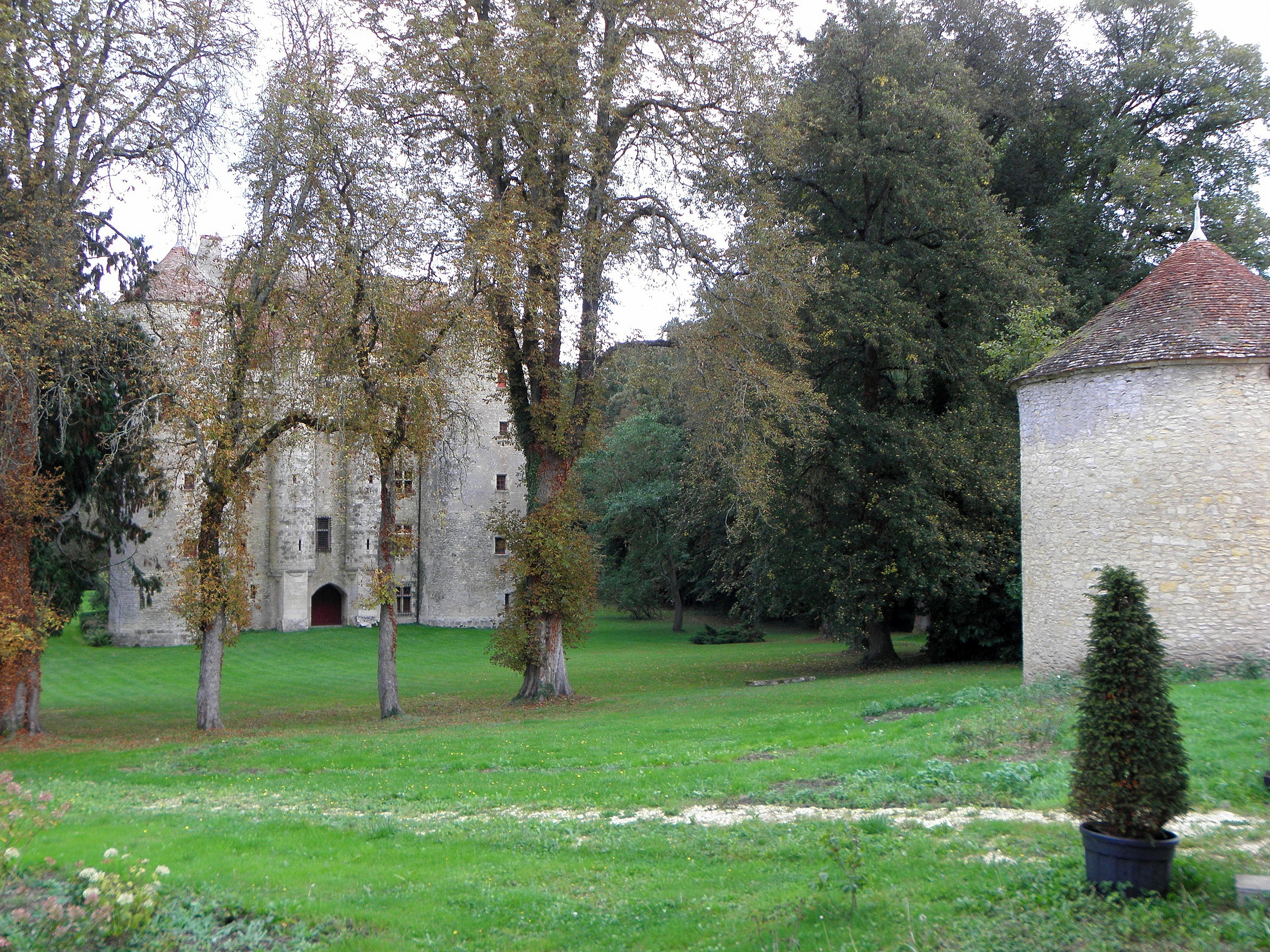 Château de Chevenon (58).